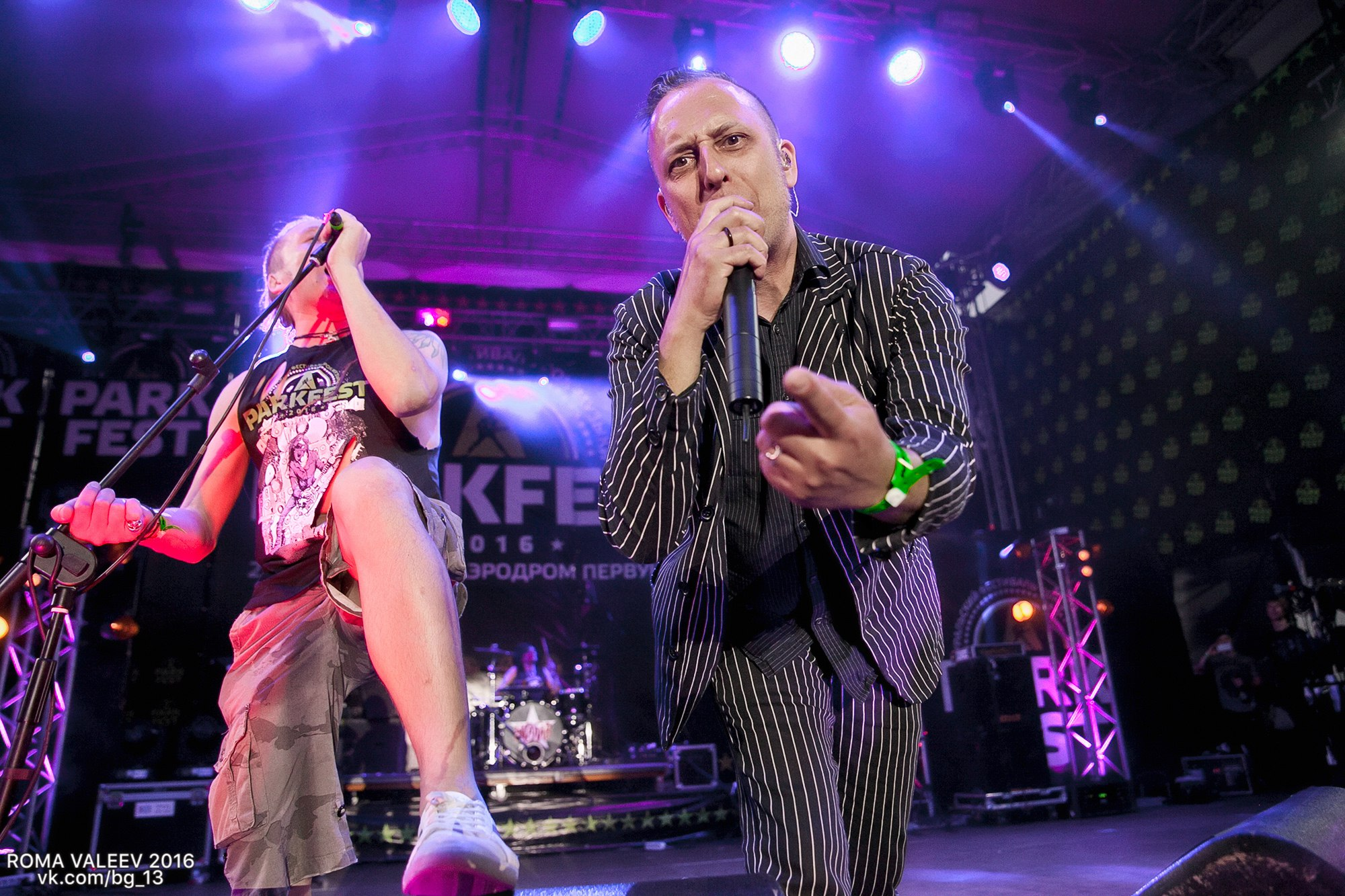 Чача на Parkfest 2016